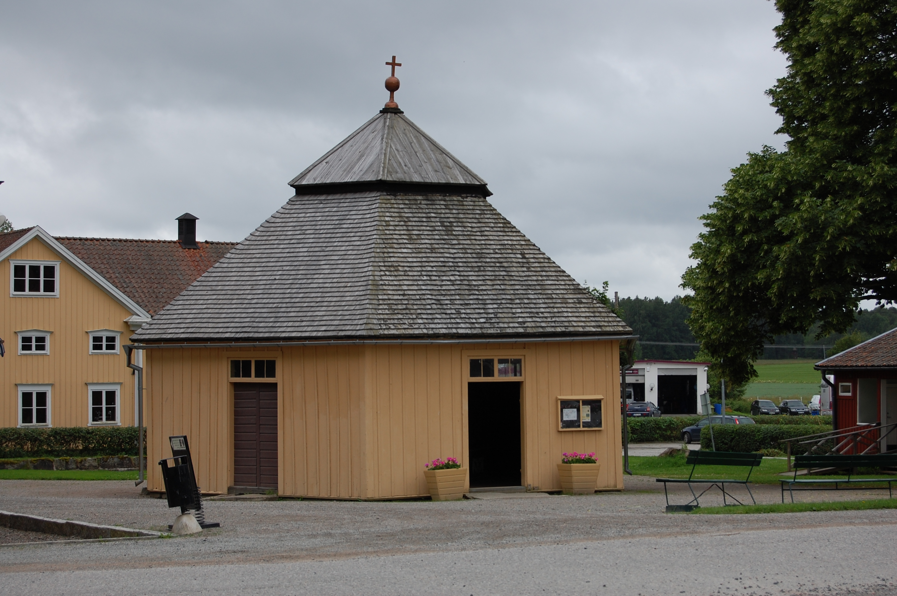 Brunnshuset på Sätra brunn (kurort), med perspektiv från Kalseniusstenen (parken)